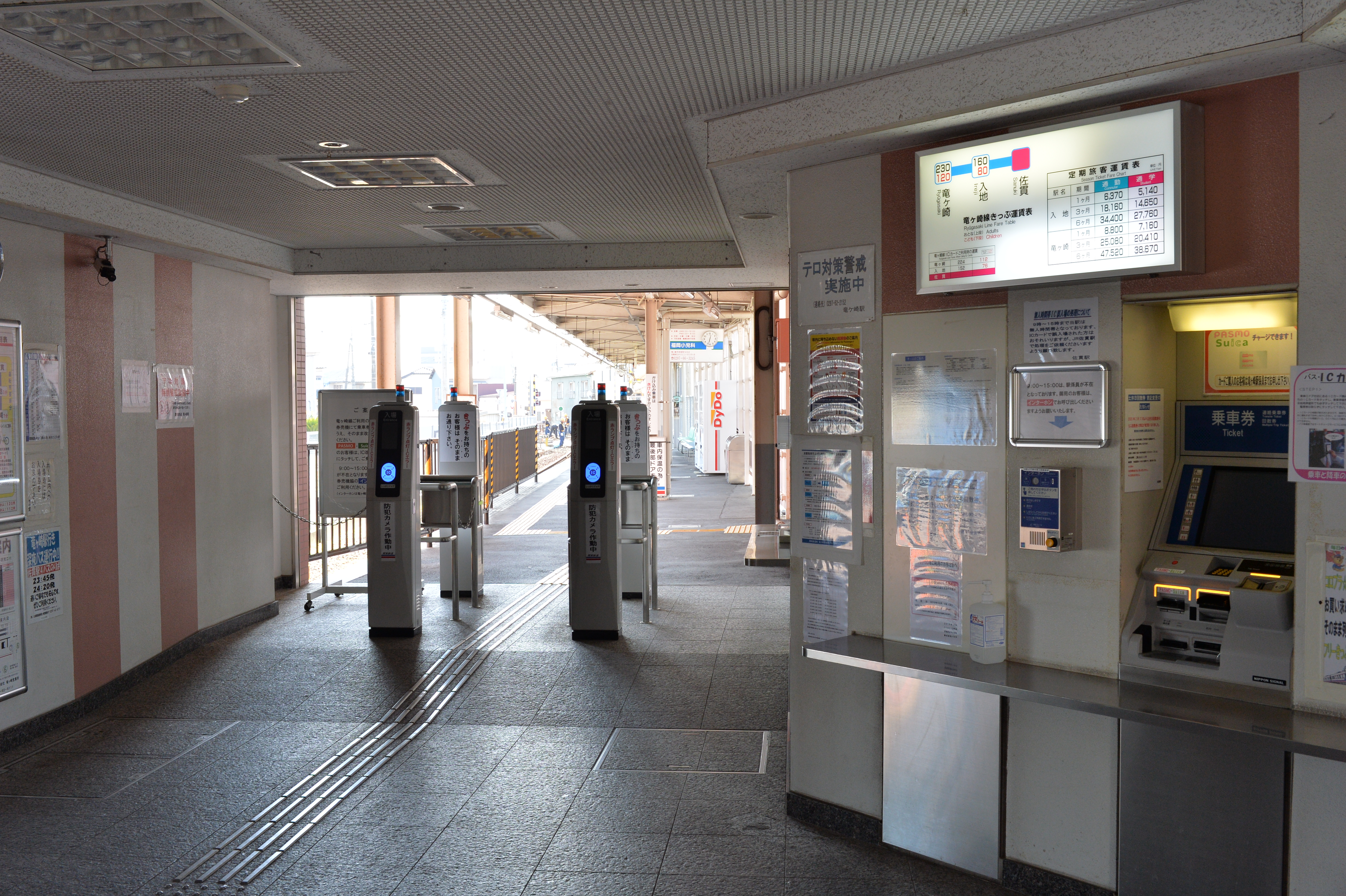 関東鉄道佐貫駅の券売機前から改札に向けて撮影。